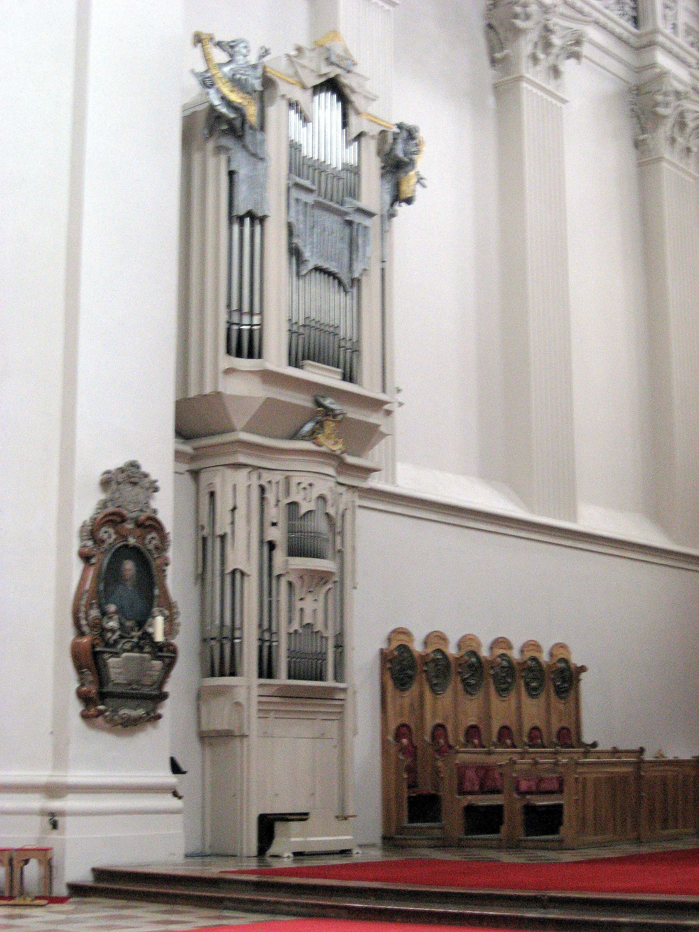 Dom St. Stephan (Passau), Chororgel